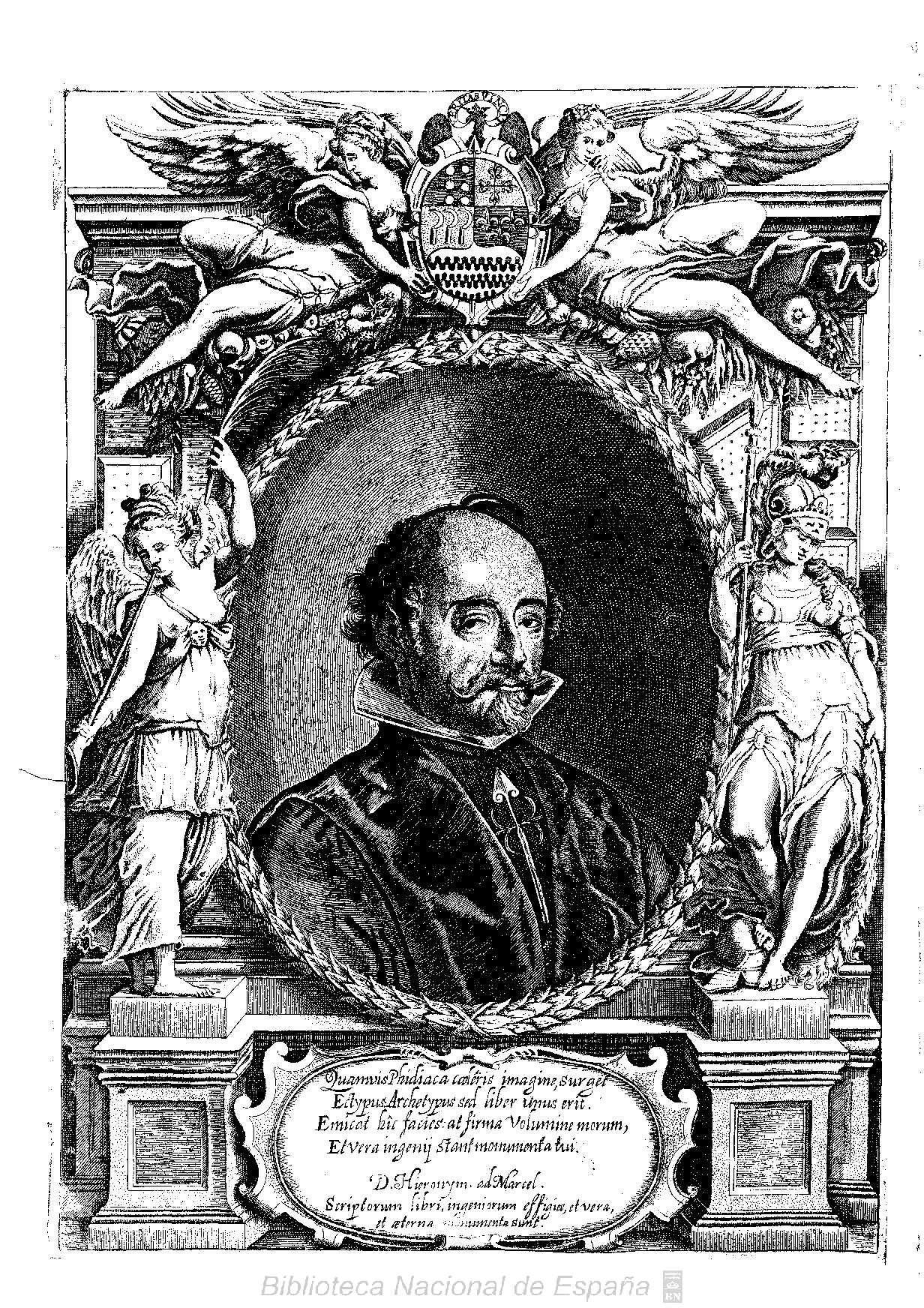 Retrato de Juan Solórzano Pereira incorporado a la segunda parte del Indiarum iure, Madrid, 1639, reutilizado en Política indiana, 1647, y Emblemata centum regio politica. 1653. Biblioteca Nacional de España